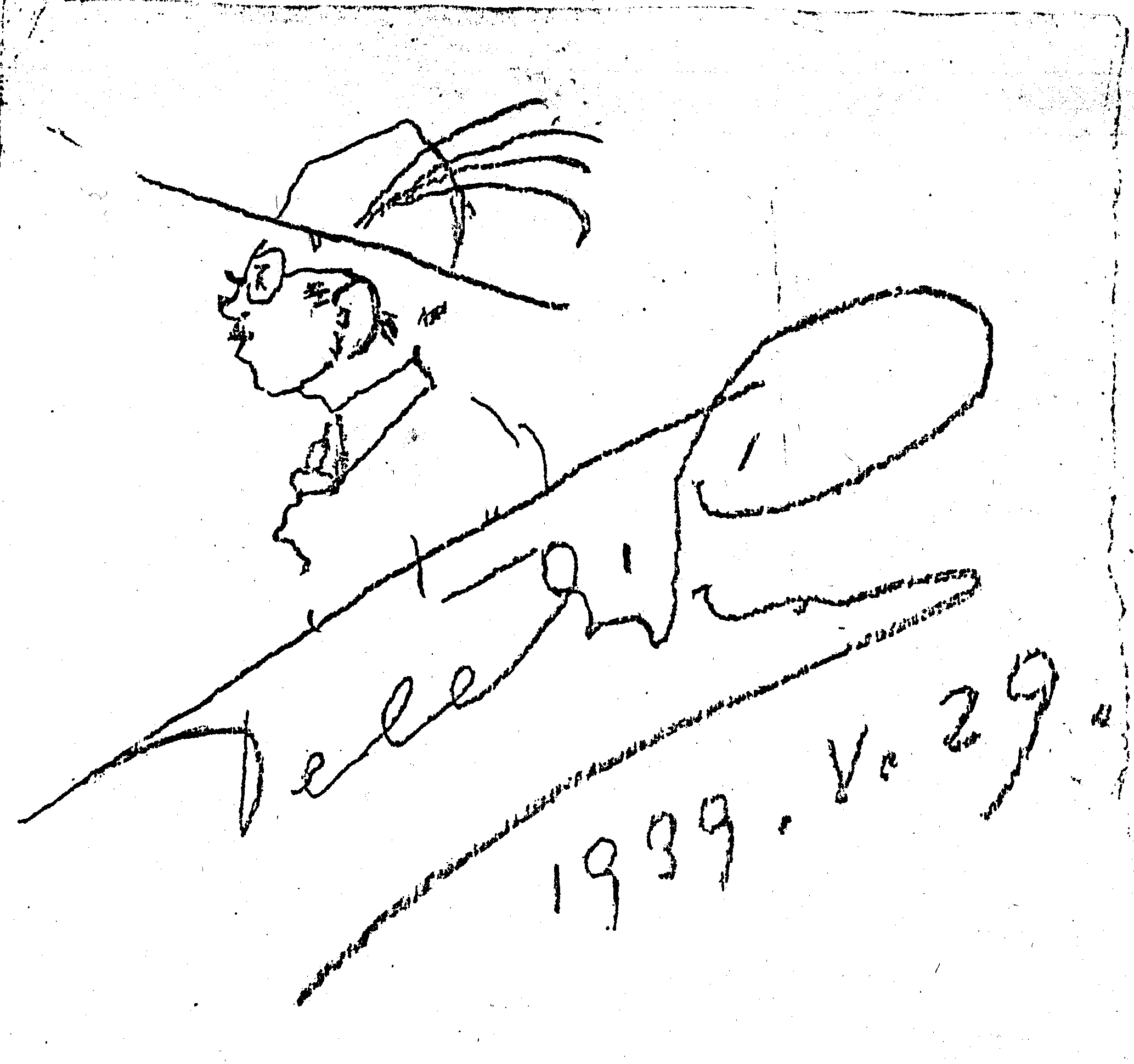 Teleki Pál önarckép-karikatúrája